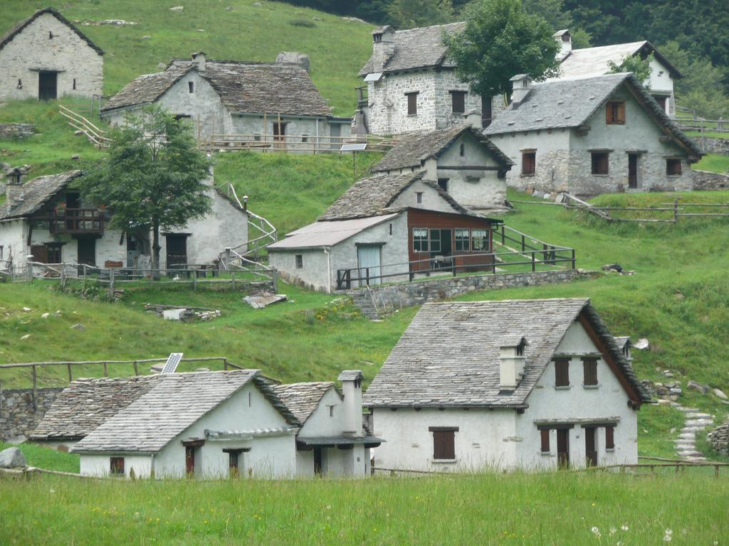 farm in valgrande national park, piemonte, italy